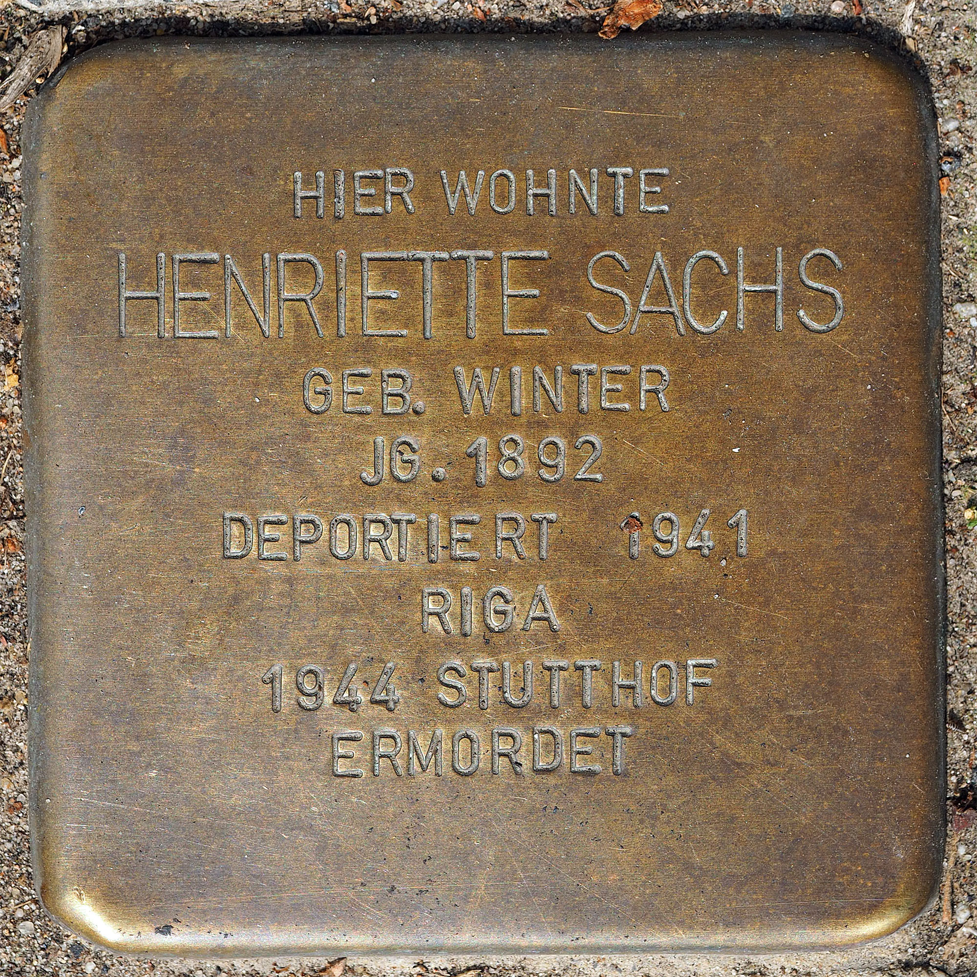 Stolpersteine GV: Sachs, Henriette